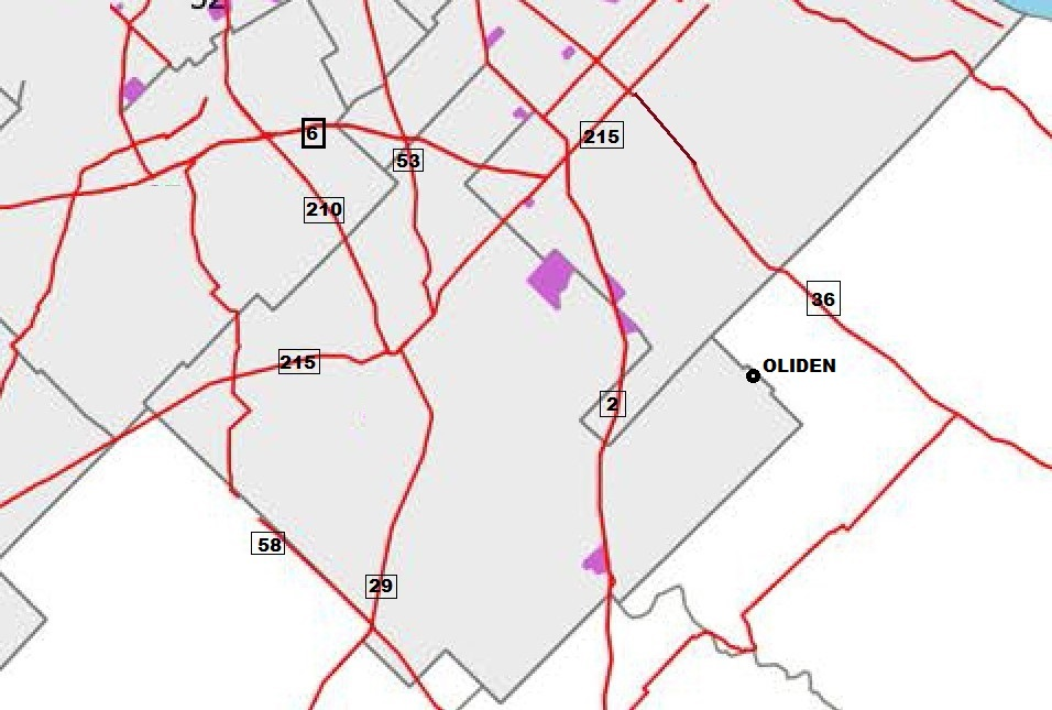 Ubicacion de Oliden Brandsen